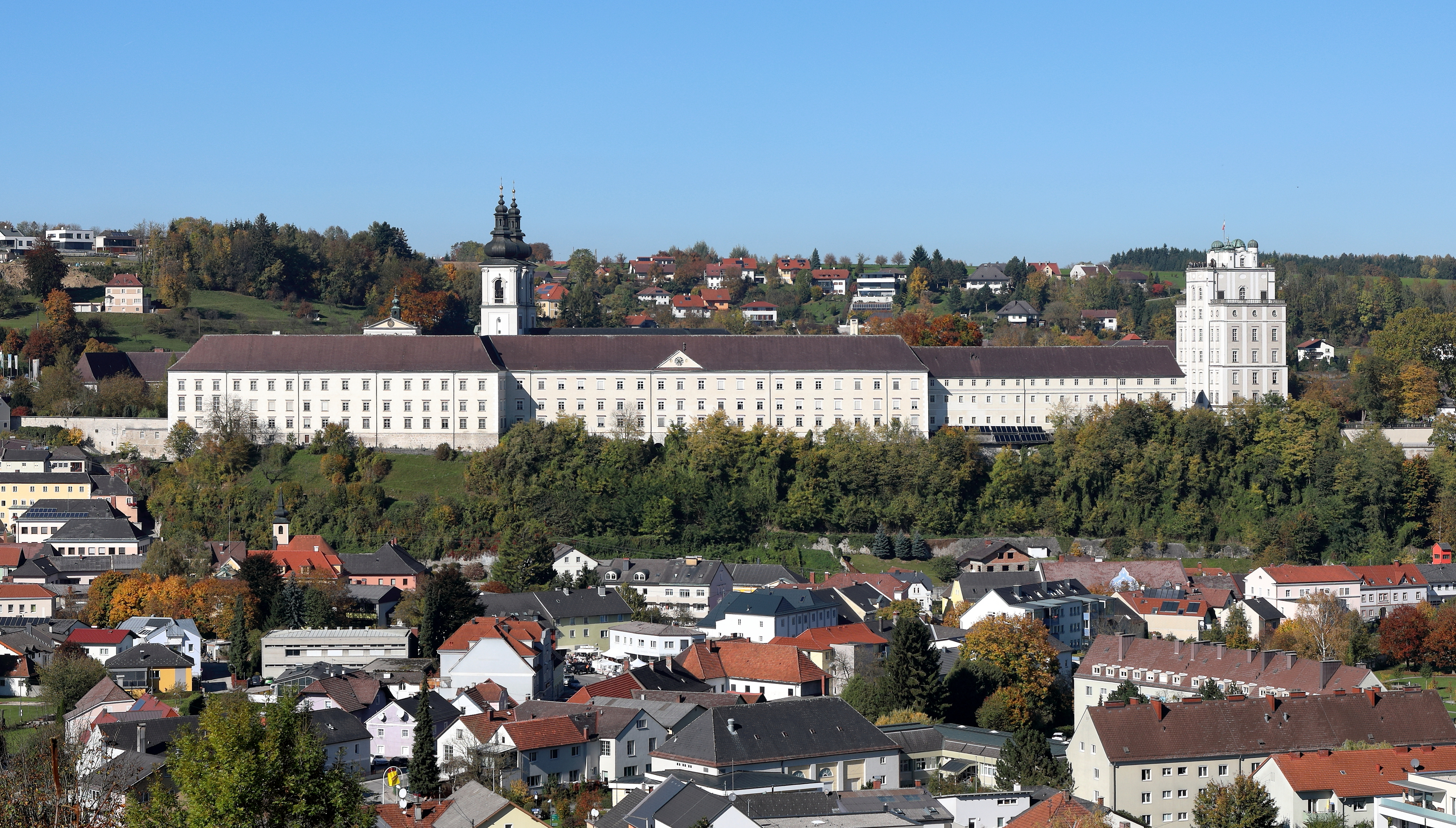 Südostansicht des Stiftes Kremsmünster in der oberösterreichischen Marktgemeinde Kremsmünster mit dem rund 50 Meter hohen und von 1749 bis 1758 errichteten „Mathematischen Turm“ (Sternwarte). Das auf einer Terrasse errichtete Kloster wurde 777 von dem bayerischen Herzog Tassilo III. gestiftet. Die Anlage des Klosterbezirkes, eine der größten Österreichs, ist ein Hauptbeispiel der österreichischen Barockbaukunst (17. und 18. Jahrhundert).